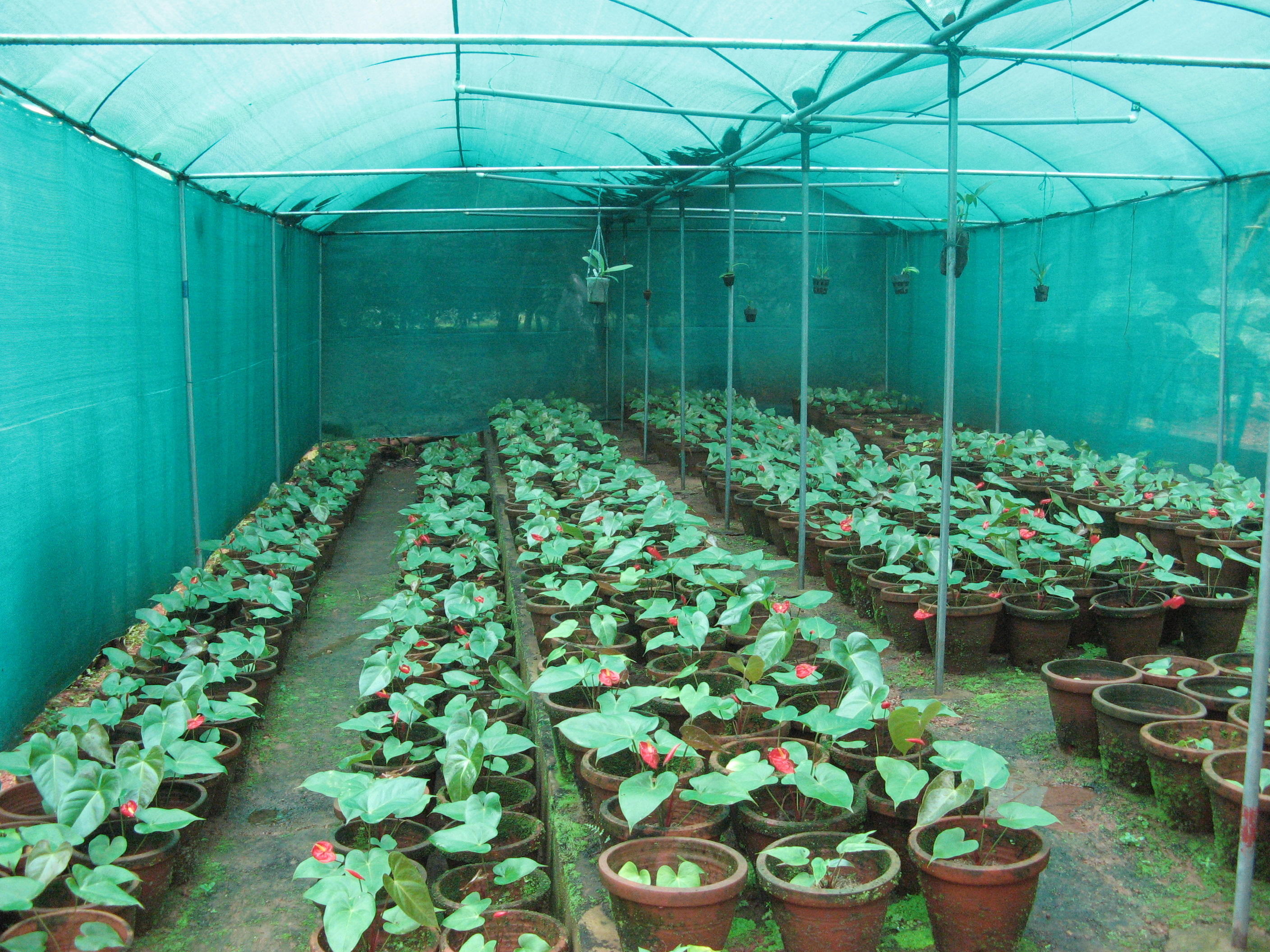 ആന്തൂറിയം തോട്ടം